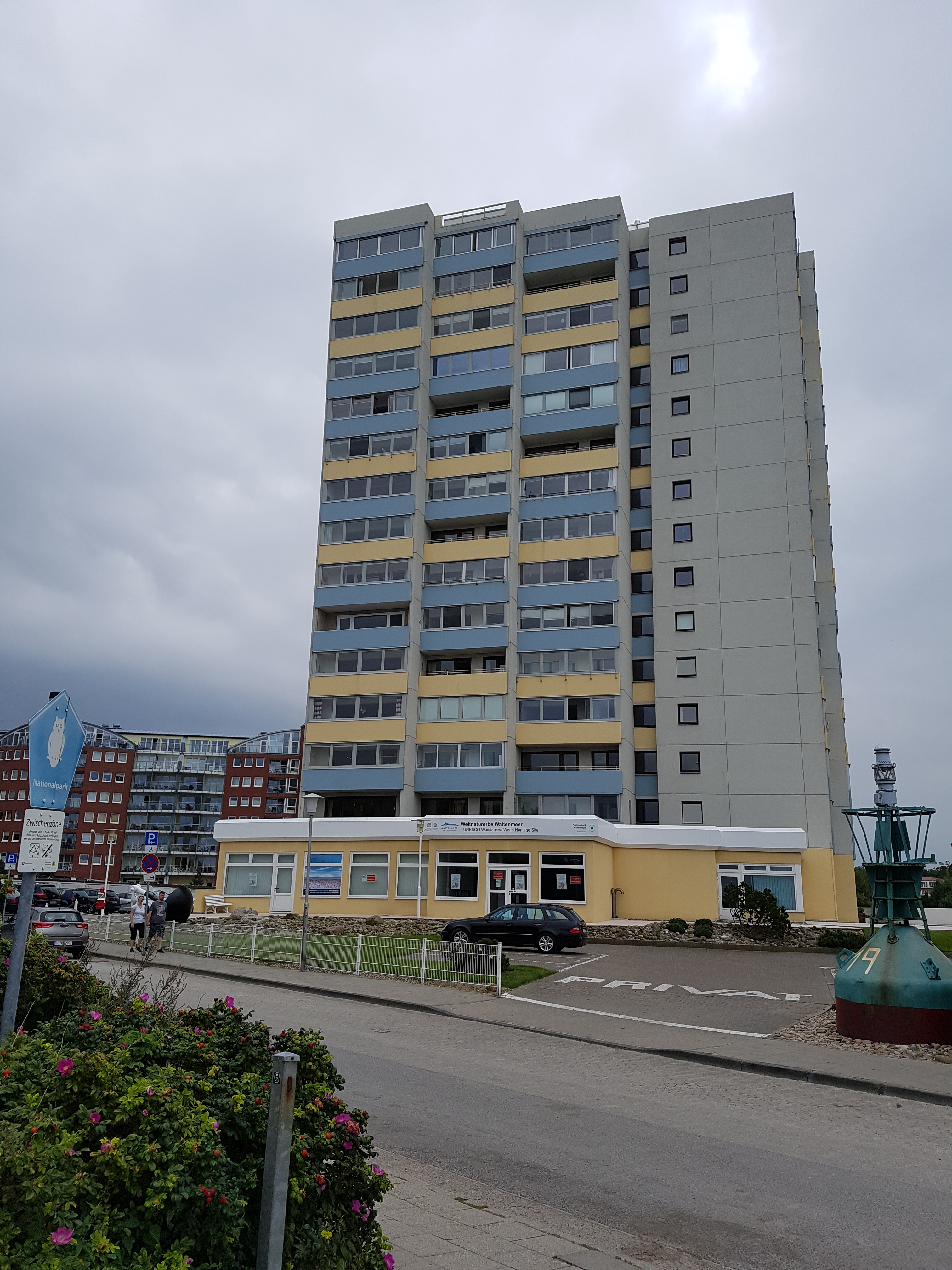 Strandhooghuus in Sahlenborg